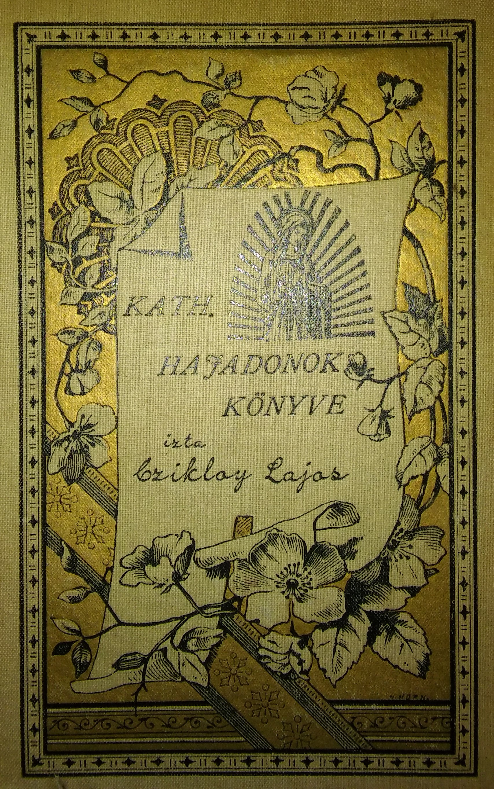 Cziklay Lajos: Kath. hajadonok könyve